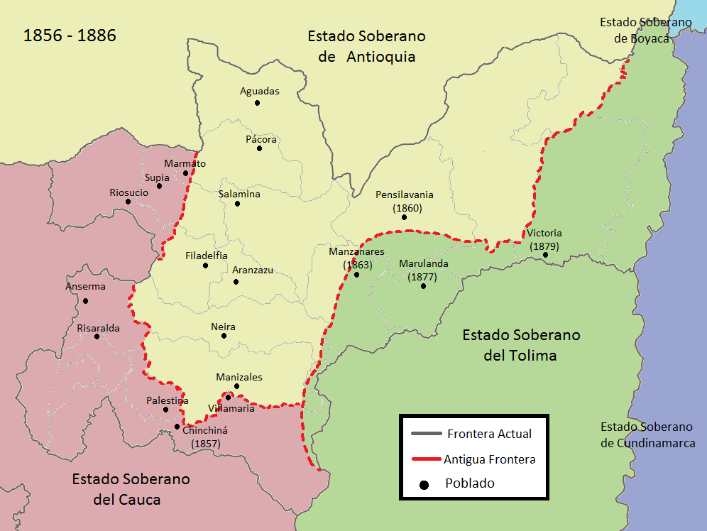 Caldas 1856 a 1886